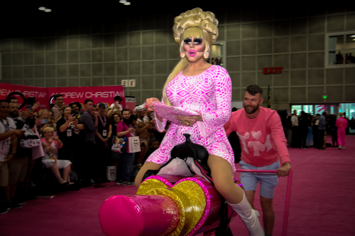 Rupaul DragCon 2019 - Los Angeles